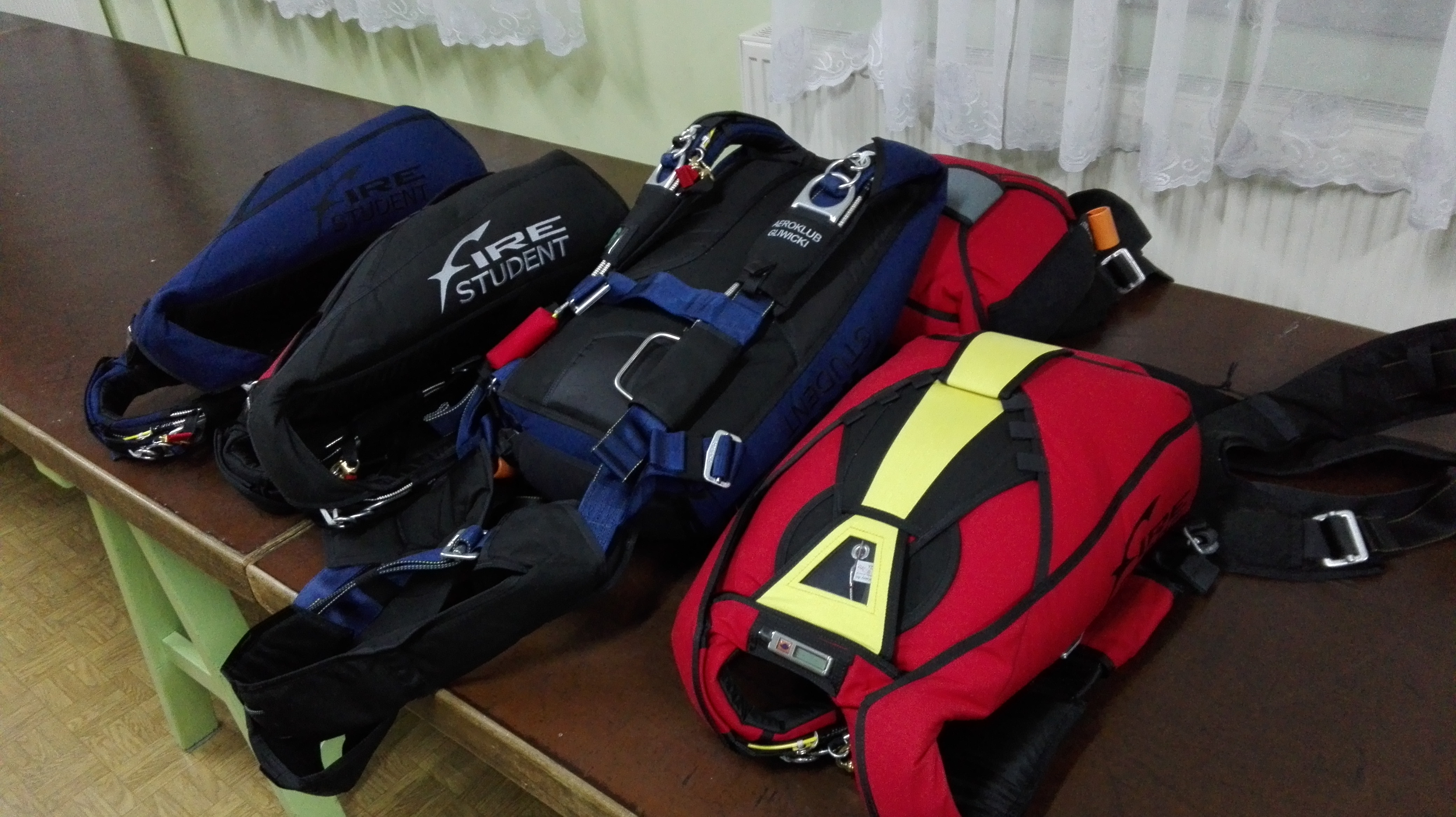 Spadochrony sekcji spadochronowej Aeroklubu Gliwickiego, pokrowce SkyWideSystems (SWS) Fire Student